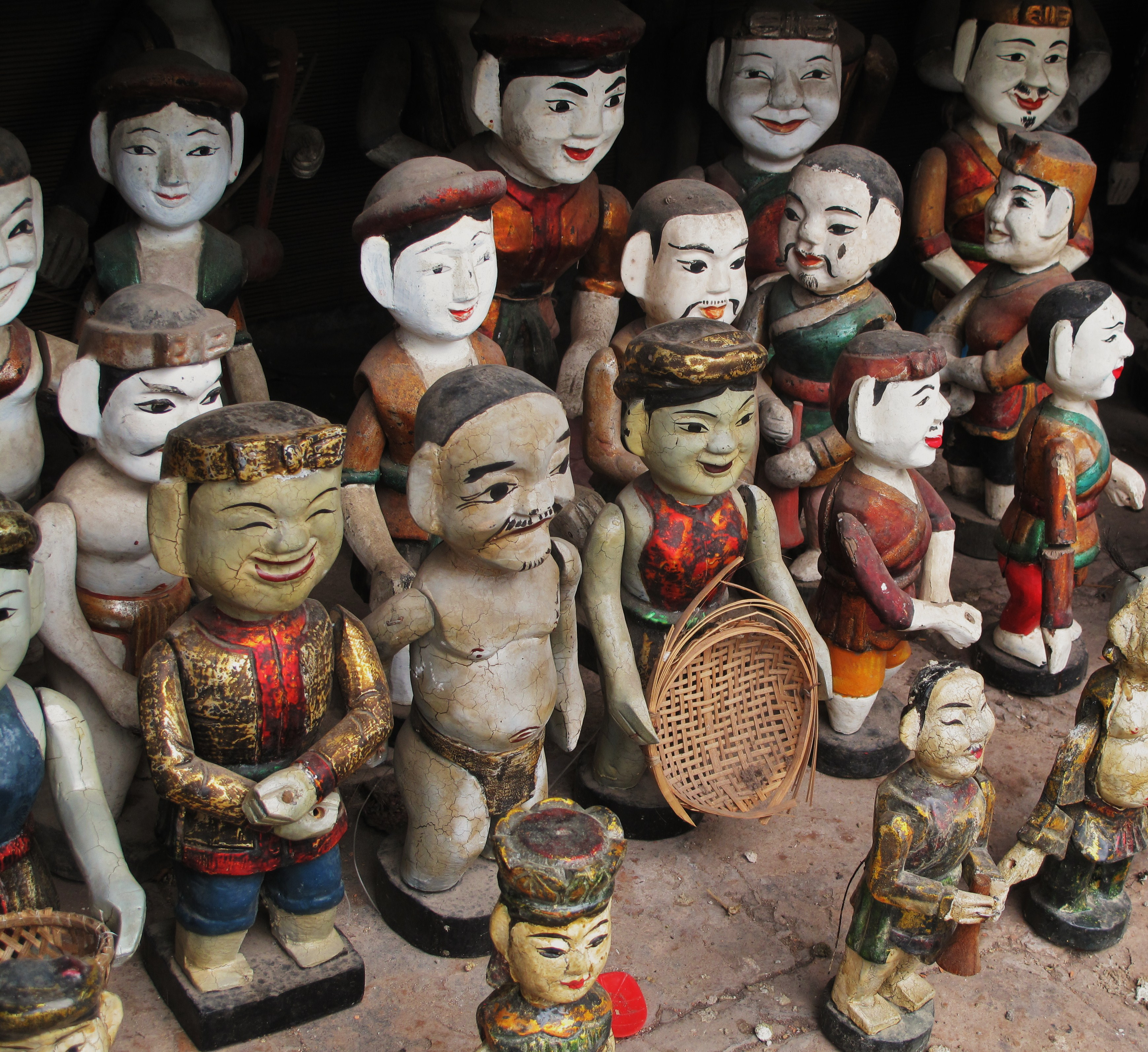 Water puppets